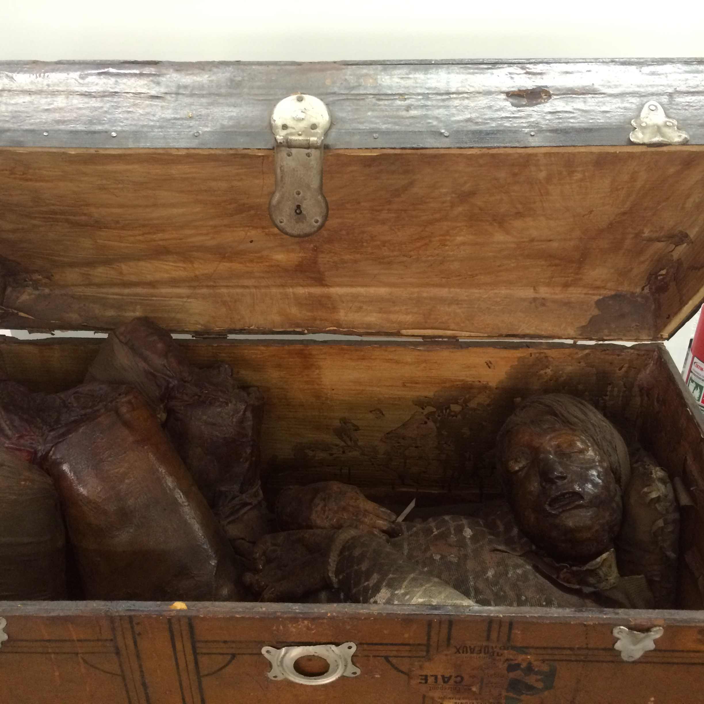 Acervo(peça principal) do Museu da Polícia Civil do Estado de São Paulo.